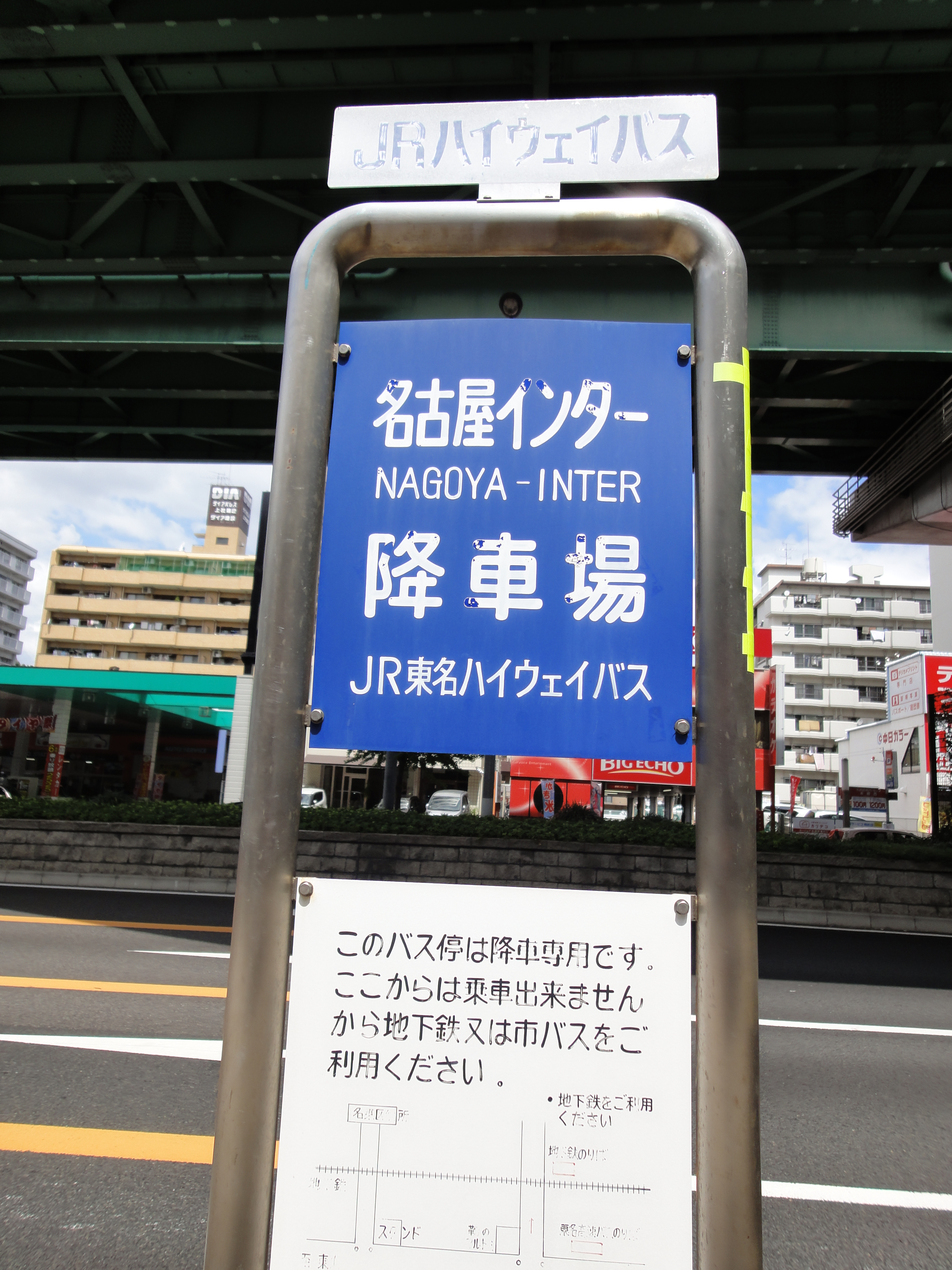 名古屋インターバス停(名古屋方面、降車専用)